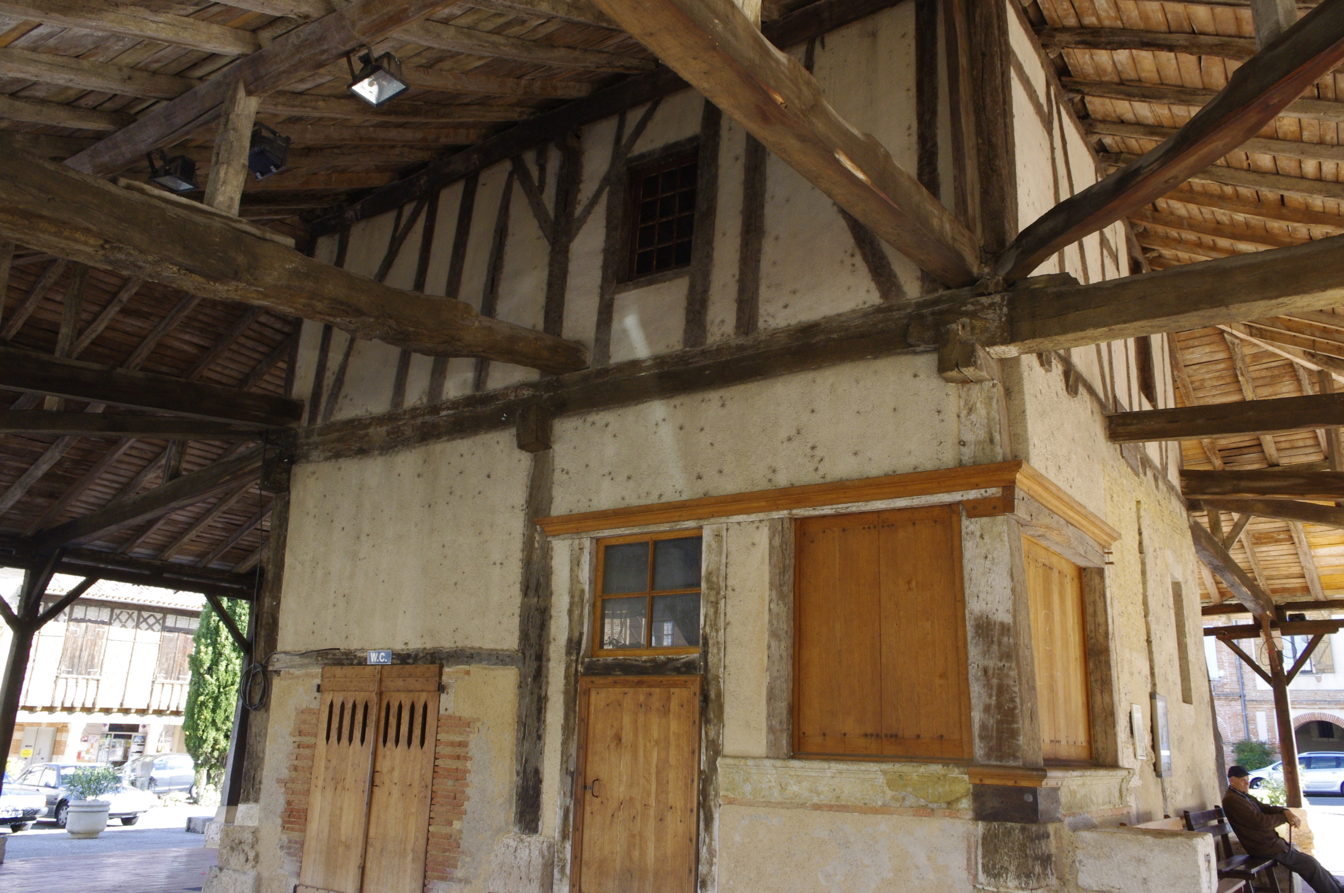 Cologne dans le Gers, France. - Halle